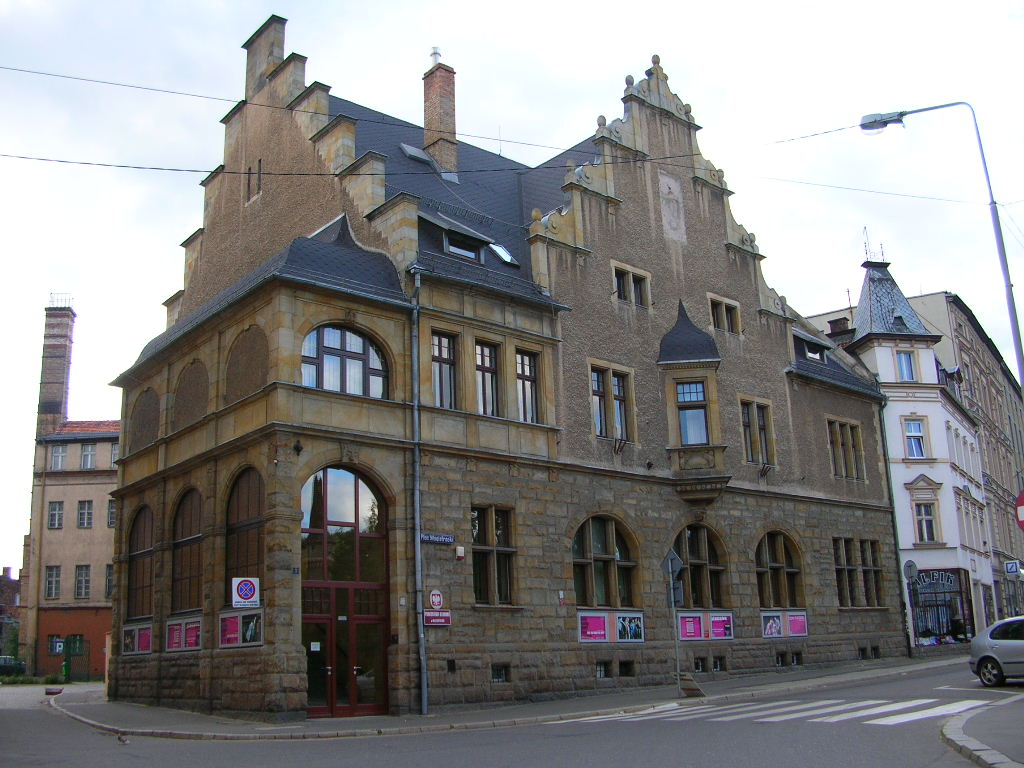 Wałbrzych, pl. Magistracki 7 - dawny bank, obecnie Prokuratura Okręgowa (zabytek nr 1555/WŁ z 13.03.1997).